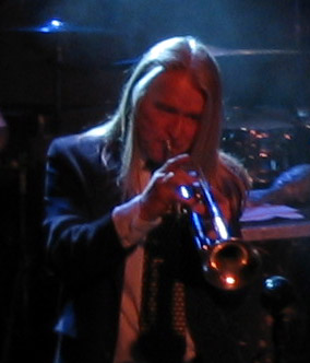 Matti Jaaranen soittaa trumpettia Tavastialla. Matti Jaaranen plays trumpet at Tavastia club. 12.10.2003.